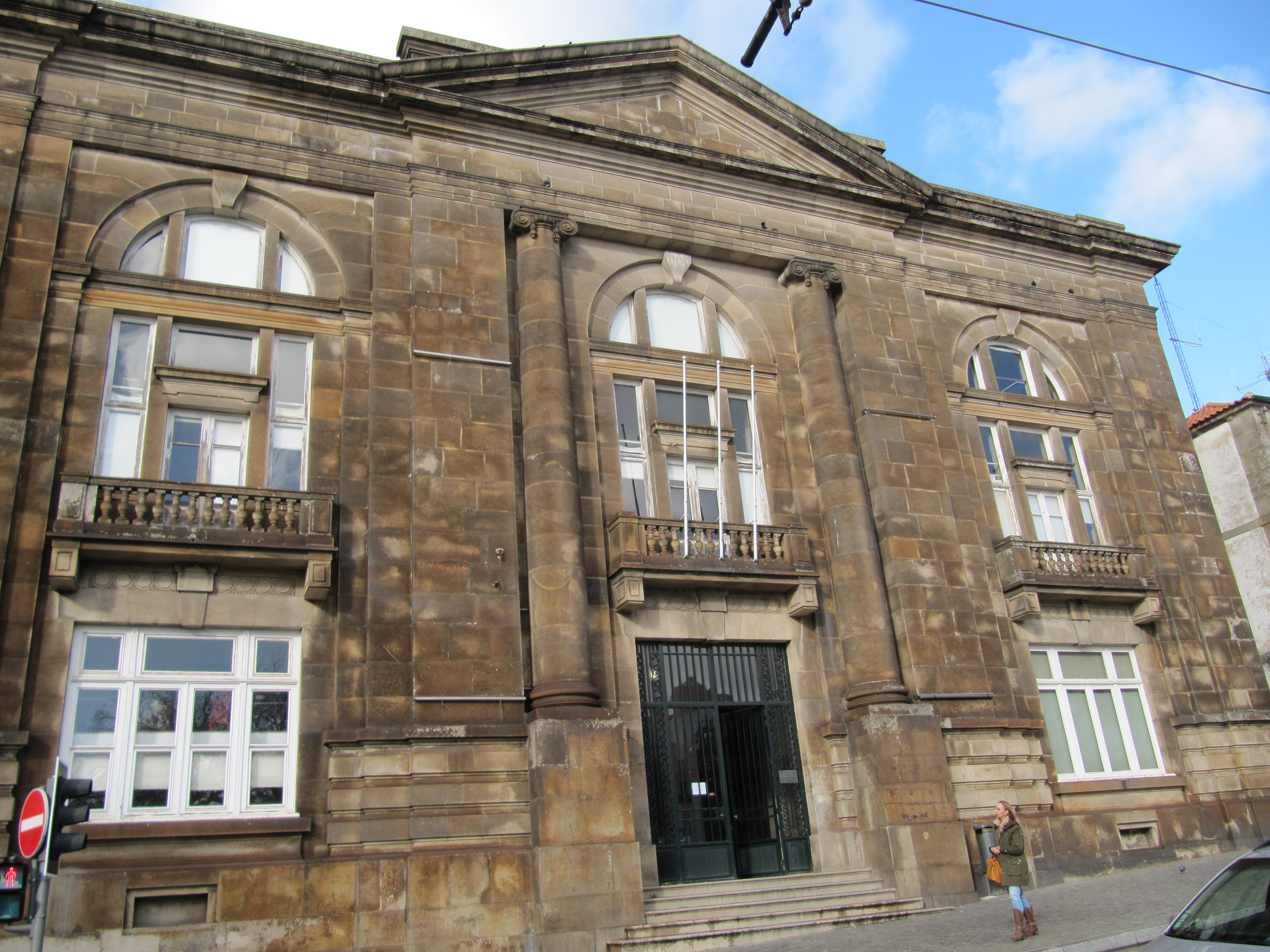 Universidade do Porto: ICBAS